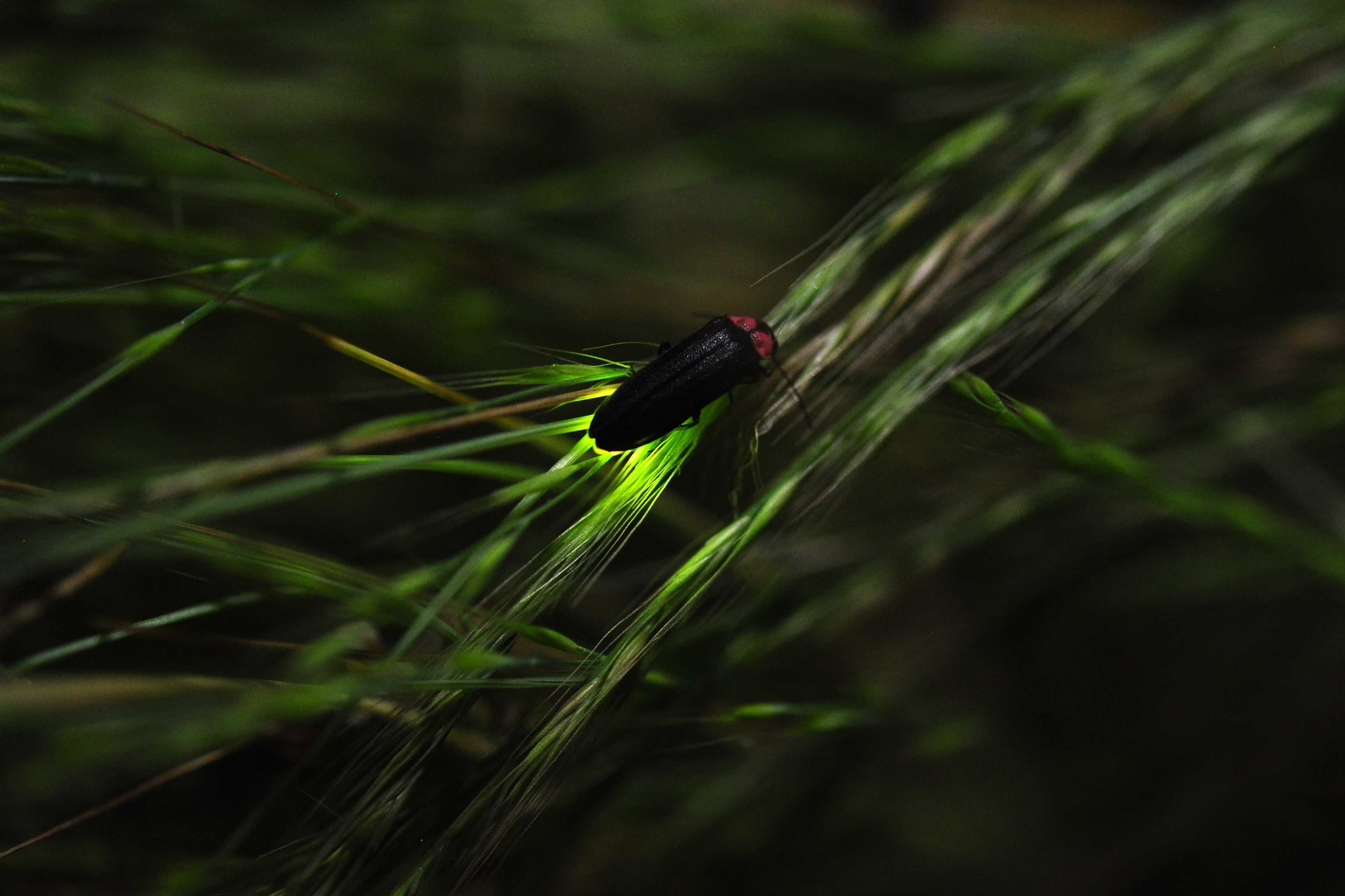 日本のホタル